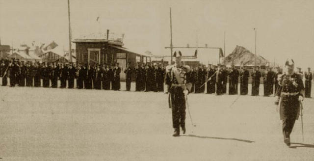 1935年9月9日、満州国皇帝の視察を受ける江防艦隊